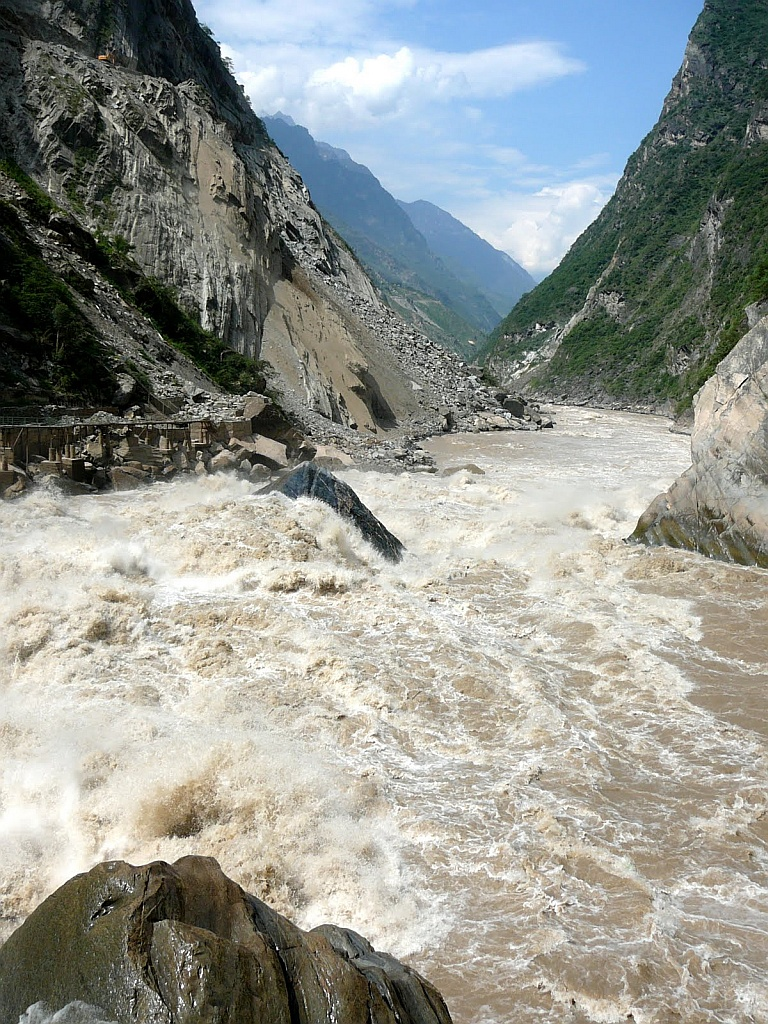 Tigersprung-Schlucht